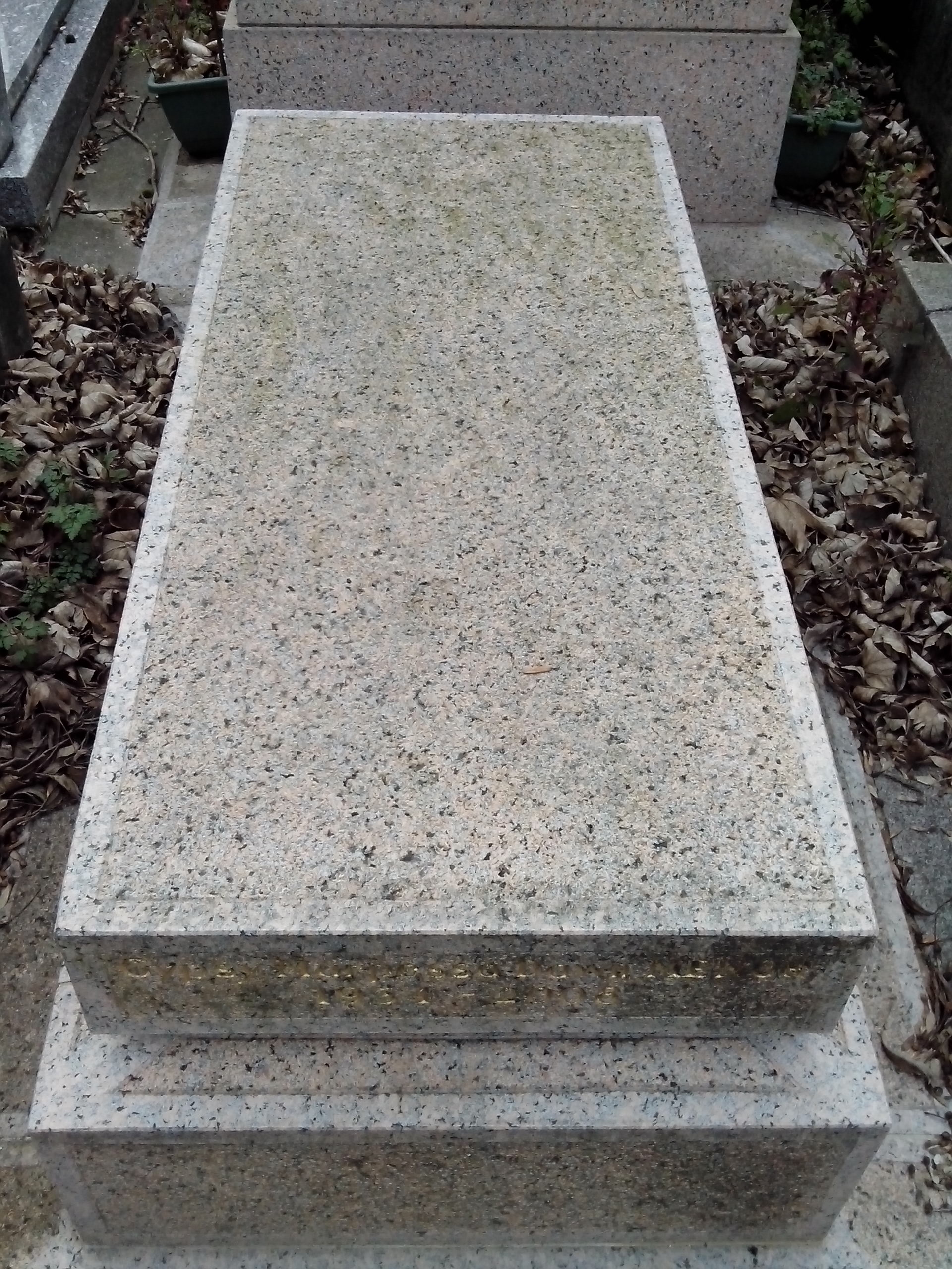 Vue d'ensemble